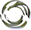 sembol